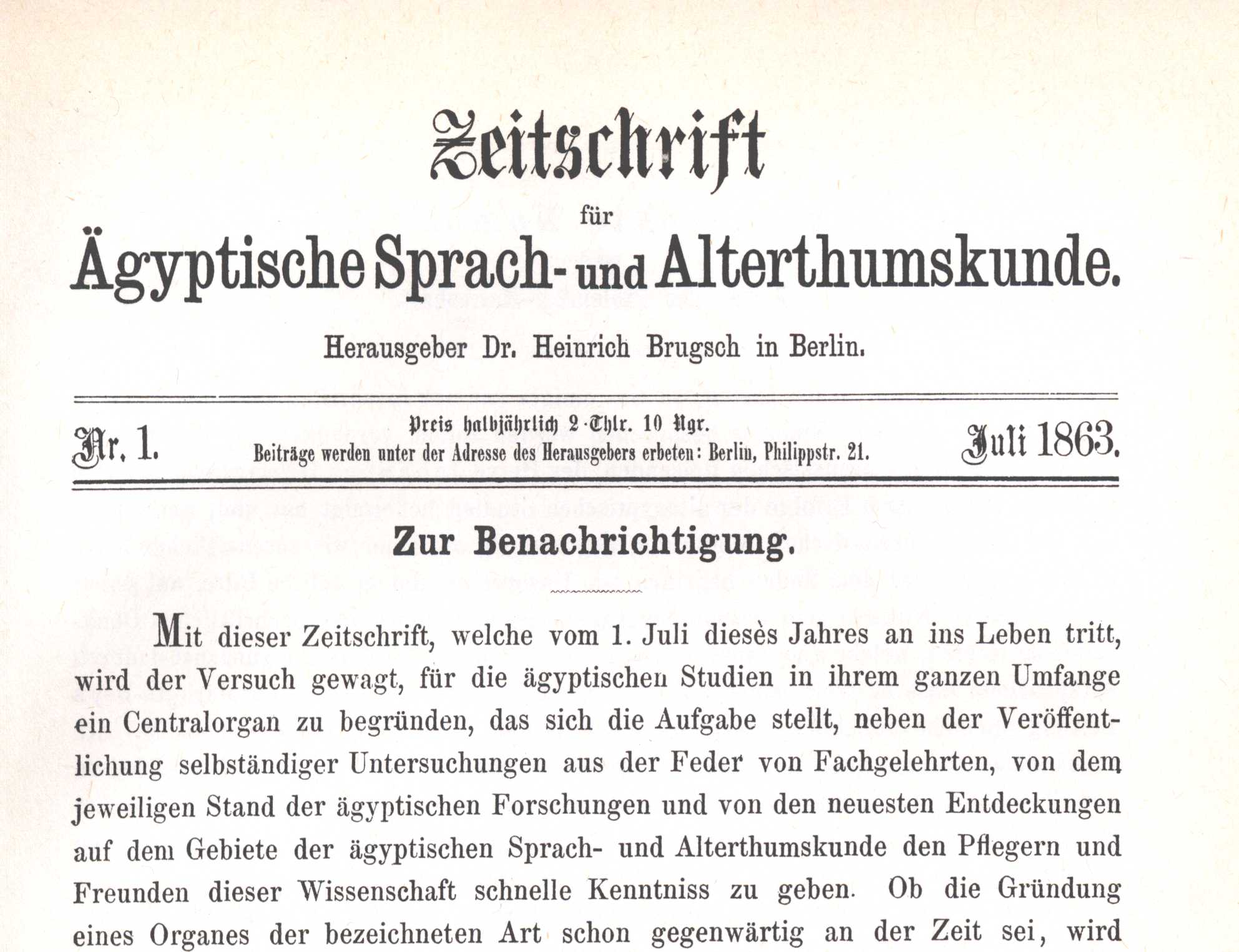 Front page of issue no 1 of Zeitschrift fuer Aegyptische Sprache und Altertumskunde